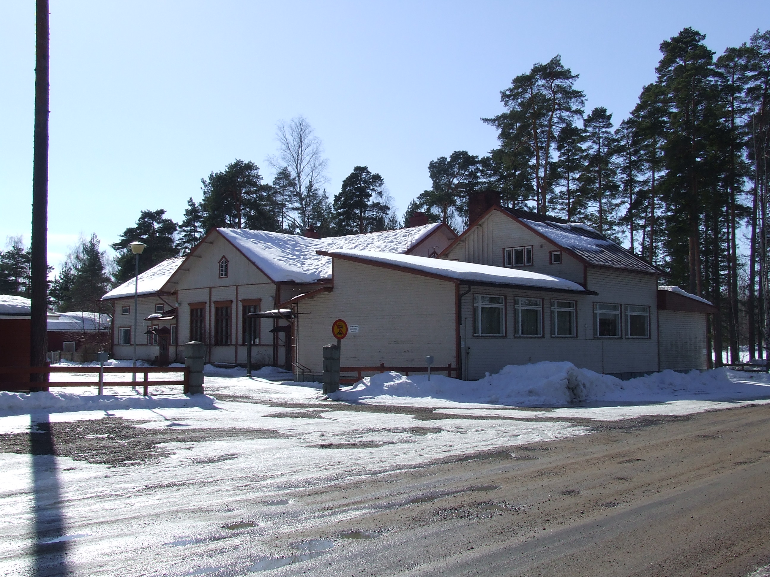 Vilniemen koulu Haminassa.